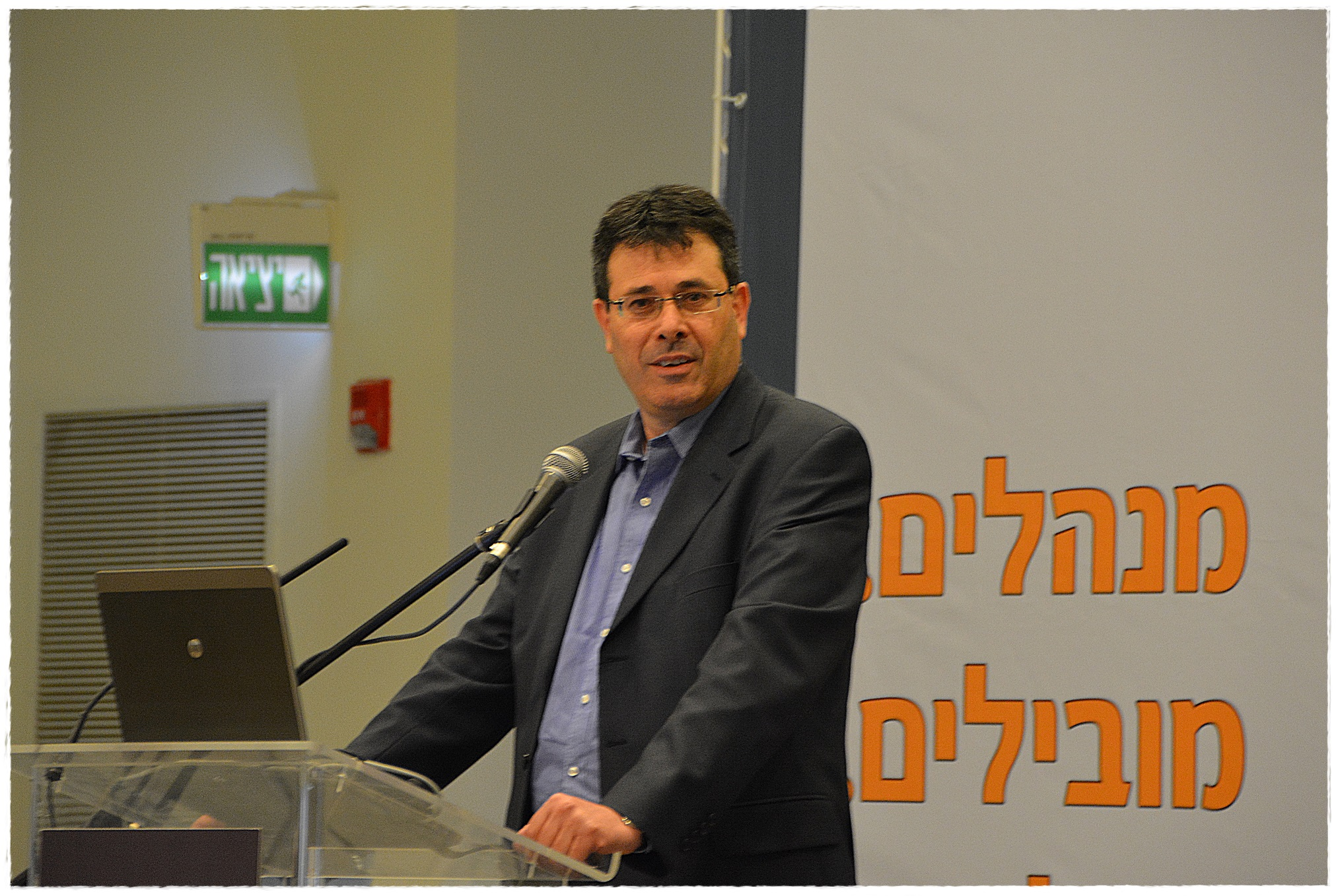 מר פרשר בכנס מנהלים 7.2015 בנק מזרחי טפחות בע"מ